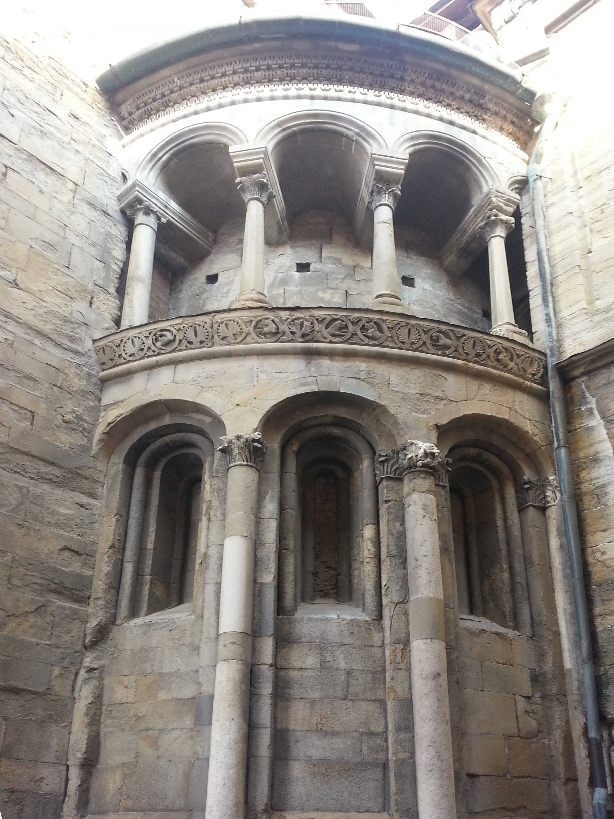 Particolare esterno della Basilica di Santa Maria Maggiore di Bergamo